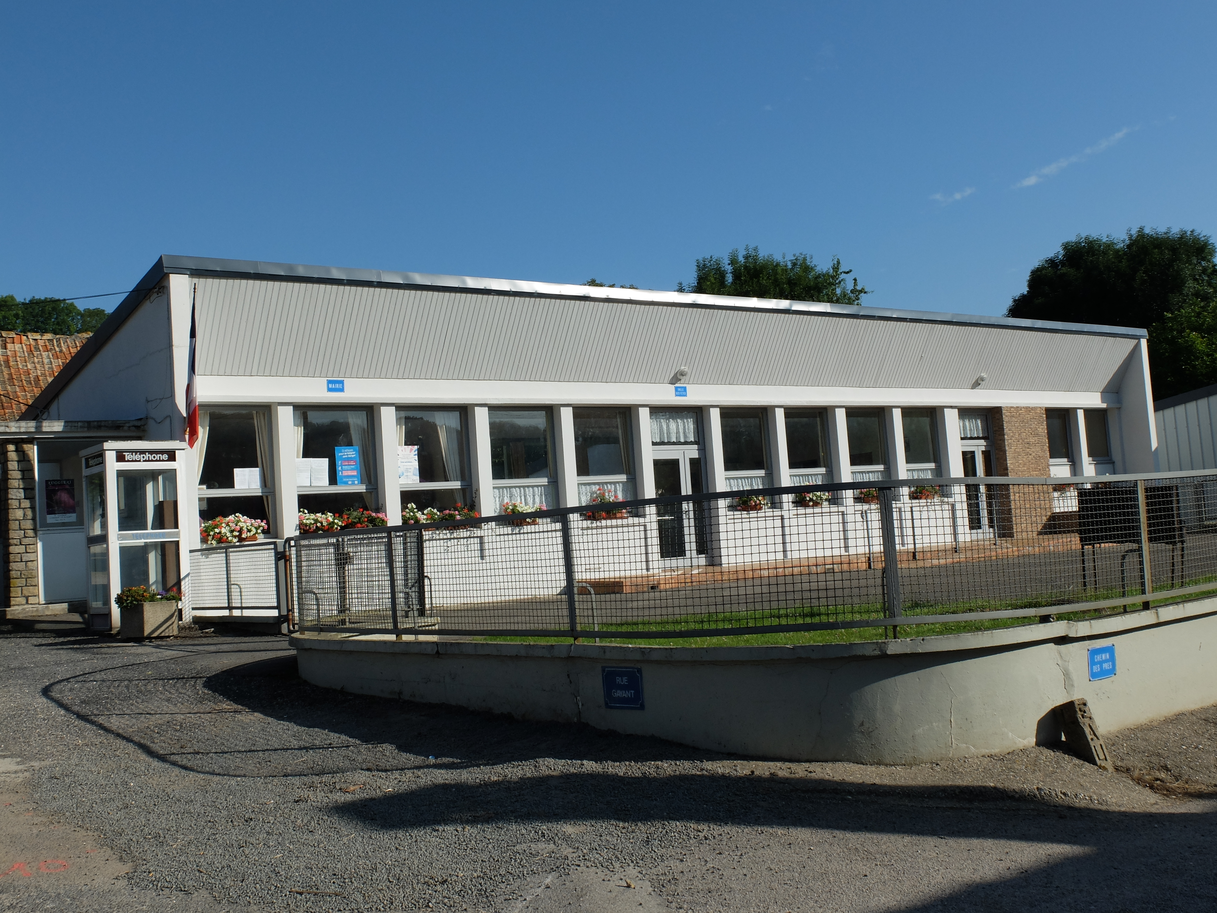 Vue du bâtiment qui sert de mairie et de salle des fêtes à Marant.